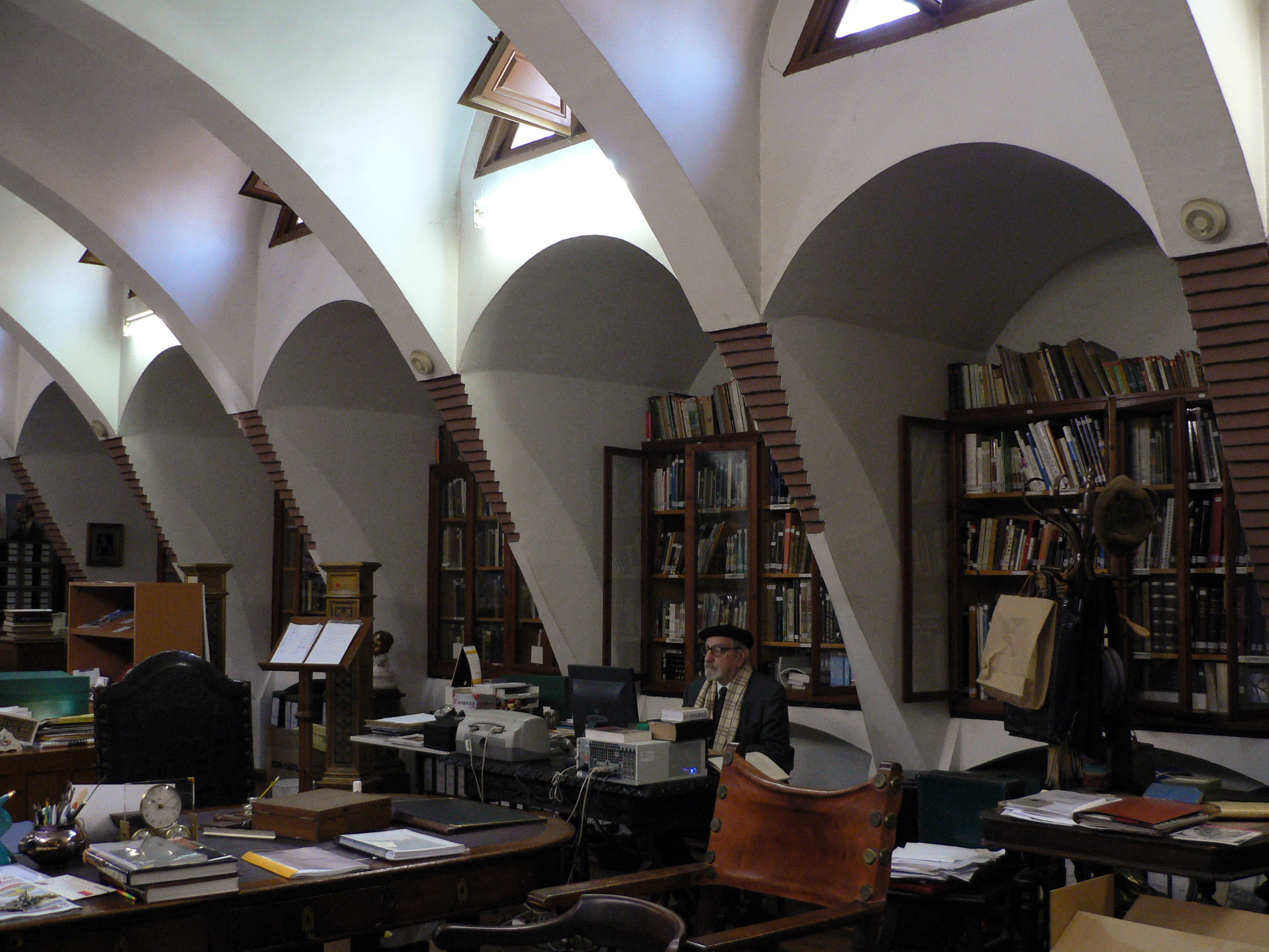 Interior de la seu Reial Càtedra Gaudí, als Pavellons Güell de Pedralbes (Barcelona), amb el Dr. Joan Bassegoda i Nonell.